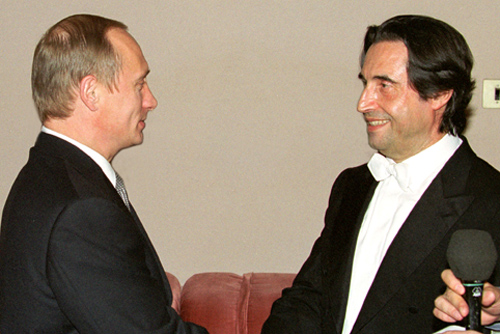 МОСКВА. После окончания концерта оркестра Миланского театра «Ла Скала» в Большом зале Московской консерватории с дирижером Риккардо Мути.